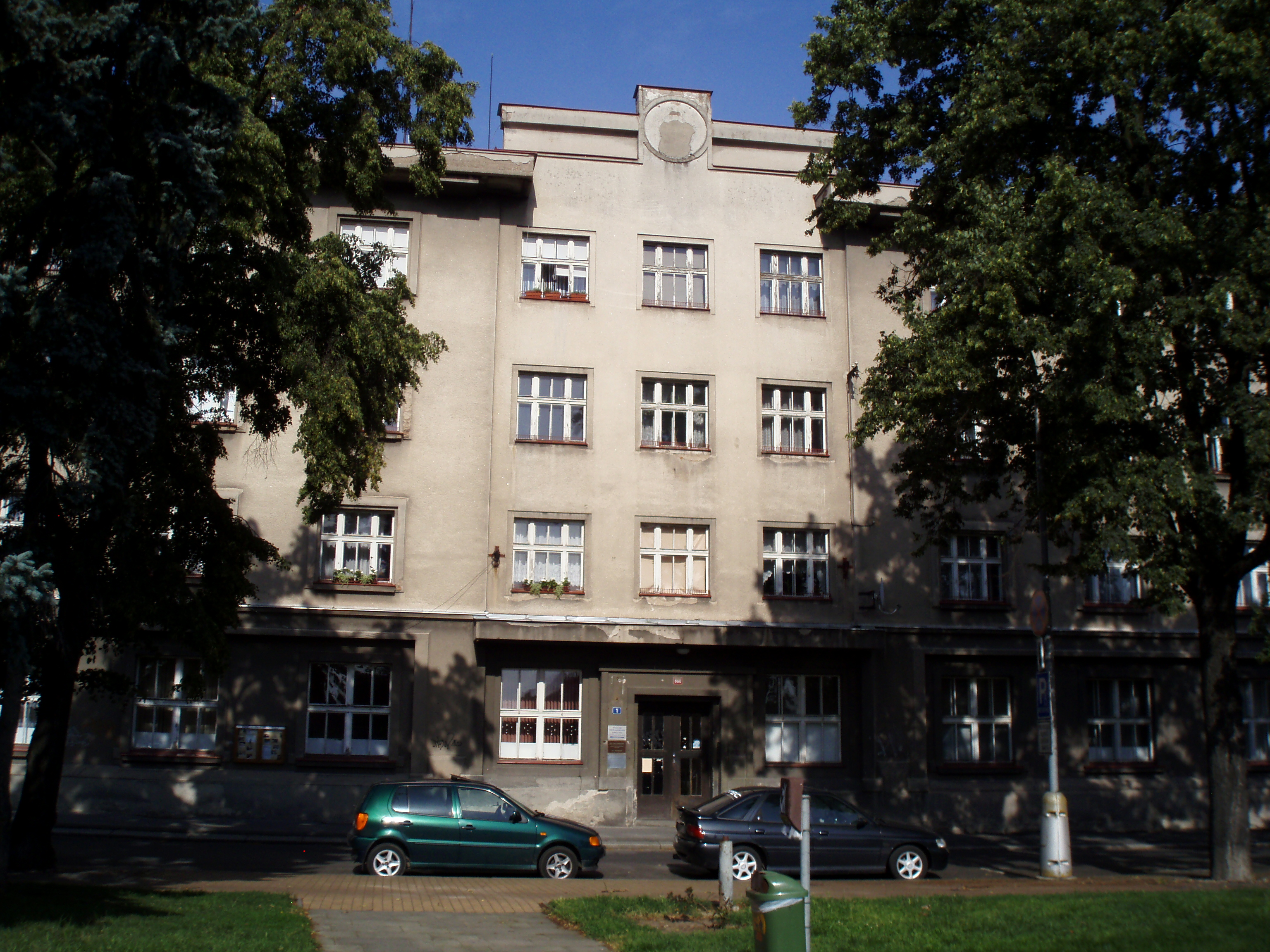 Bývalá radnice Pražského Předměstí